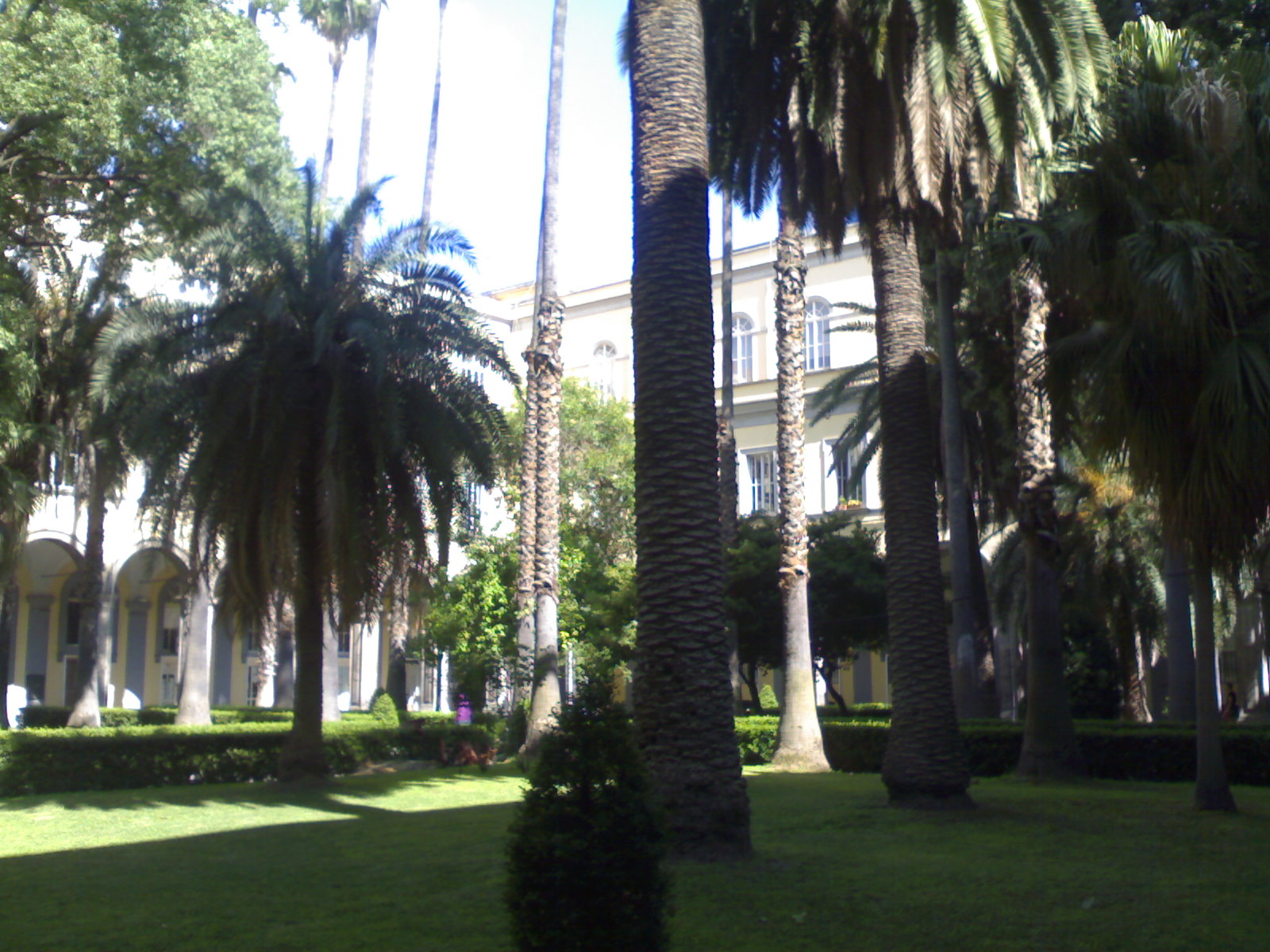 Chiostro di Sant'Andrea delle Dame (Napoli)